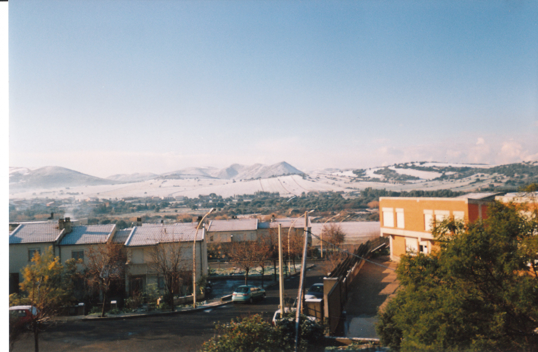 Nevicata a Santadi nel gennaio 1999